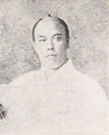 西成度（1835-1891）